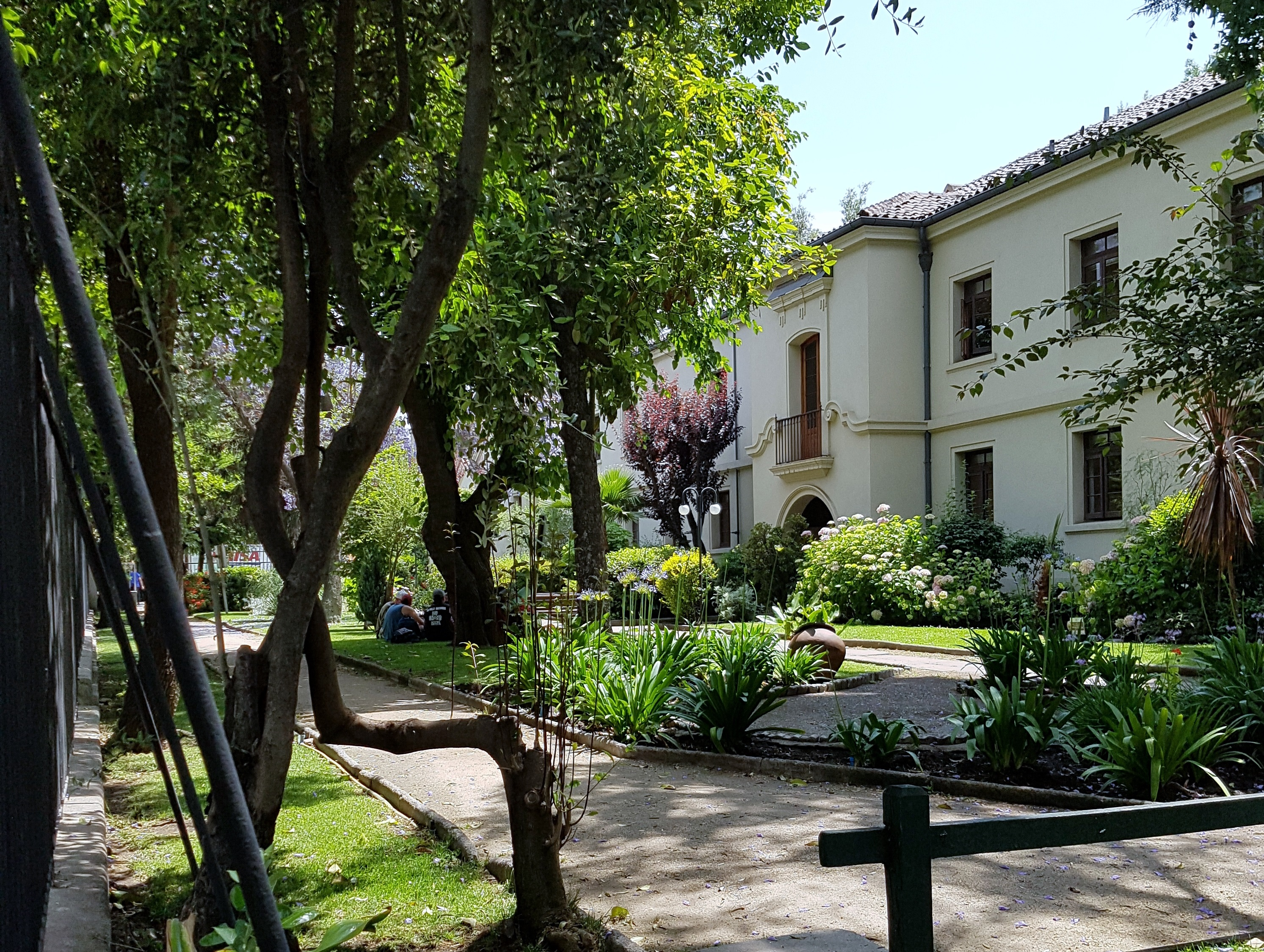 Campus Los Leones de la Universidad San Sebastián, Providencia, Santiago de Chile. Hasta 2012 fue sede del Santiago College.